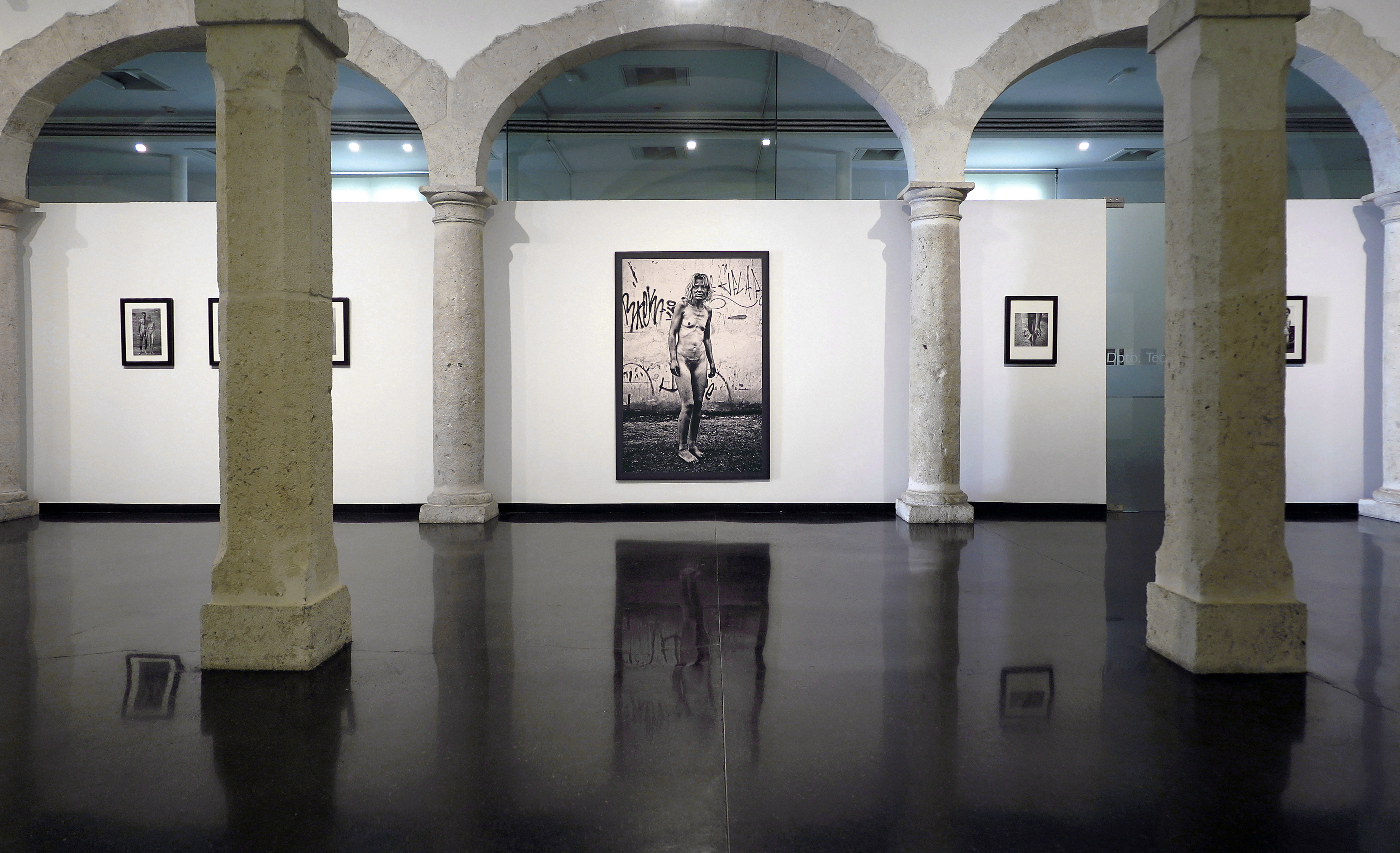 Exposición "Prostitución. Retratos de una vida en la calle" de Rubén García en el Centro Andaluz de la Fotografía (CAF) de Almería. 23/03/2018.